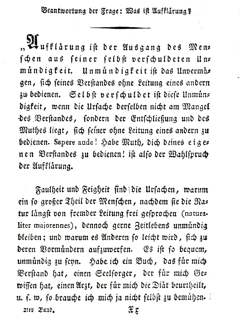 Immanuel Kant, Beantwortung der Frage: Was ist Aufklärung. Beginn des Traktats. (EA 1784). (Immanuel Kants vermischte Schriften; Hrsg.: Johann Heinrich Tieftrunk; Bd. 2. Halle 1799) Ref. "Aufklärung ist der Ausgang des Menschen aus seiner selbst verschuldeten Unmündigkeit. Unmündigkeit ist das Unvermögen, sich seines Verstandes ohne Leitung eines andern zu bedienen. Selbst verschuldet ist diese Unmündigkeit, wenn die Ursache derselben nicht am Mangel des Verstandes, sondern der Entschließung und des Muthes liegt, sich seiner ohne Leitung eines andern zu bedienen. Sapere aude! Habe Muth, dich deines eigenen Verstandes zu bedienen! ist also der Wahlspruch der Aufklärung. Faulheit und Feigheit sind die Ursachen, warum ein so großer Theil der Menschen, nachdem sie die Natur längst von fremder Leitung frei gesprochen (naturaliter majorennes), dennoch gerne Zeitlebens unmündig bleiben; und warum es Anderen so leicht wird, sich zu deren Vormündern aufzuwerfen. Es ist so bequem, unmündig zu sein. Habe ich ein Buch, das für mich Verstand hat, einen Seelsorger, der für mich Gewissen hat, einen Arzt der für mich die Diät beurtheilt, u. s. w, so brauche ich mich ja nicht selbst zu bemühen."